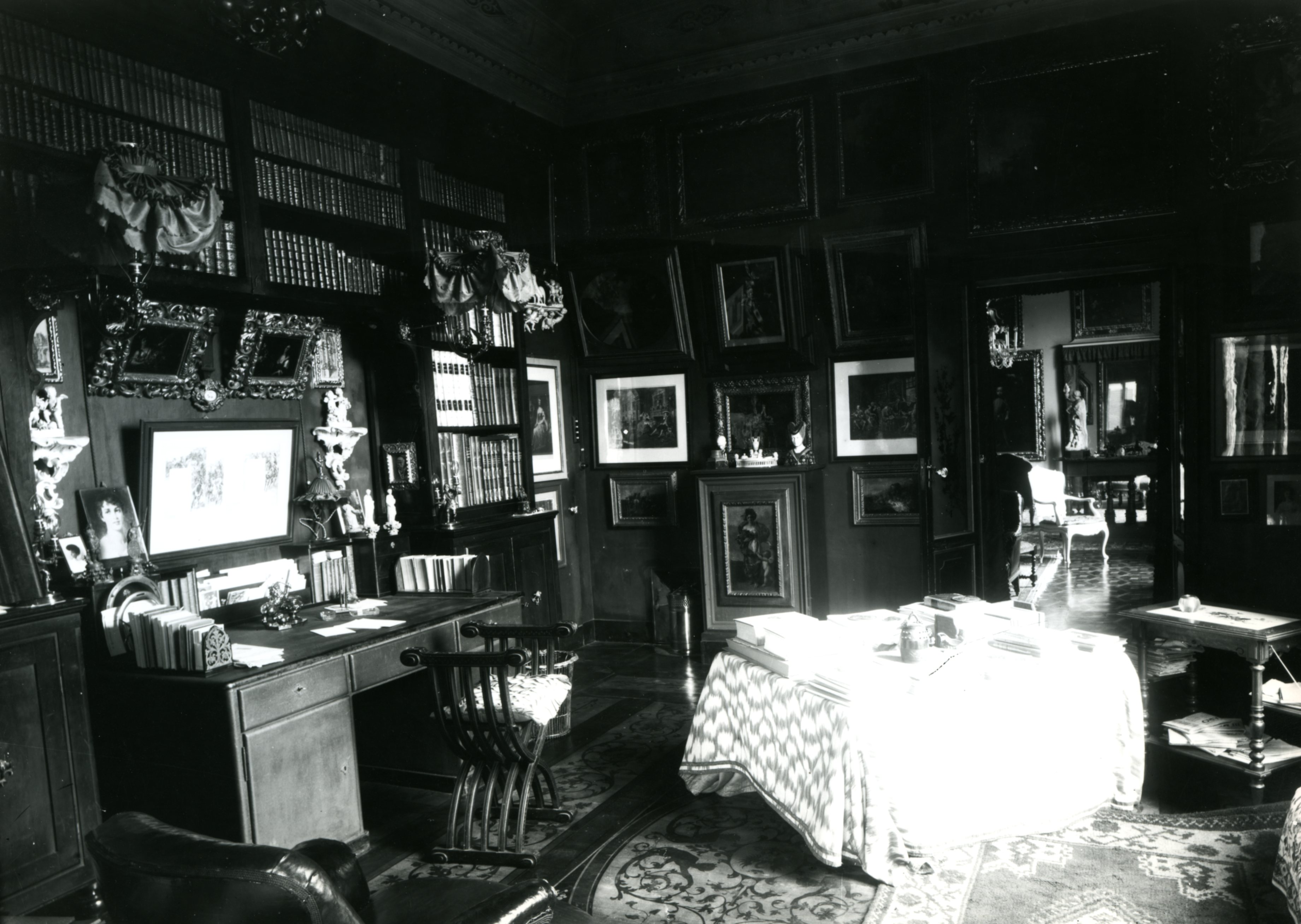 Lo studio del marchese Matteo Campori all'interno del palazzo di famiglia in via Ganaceto a Modena